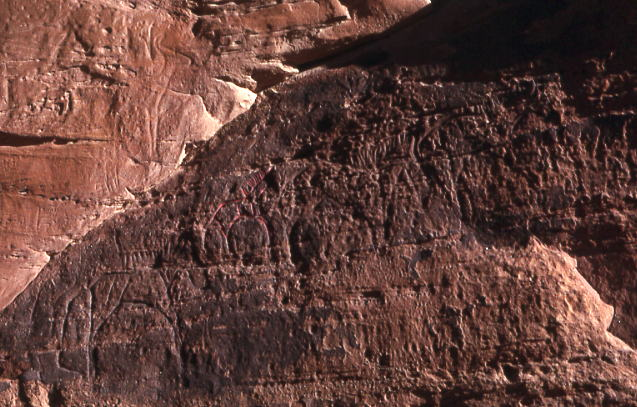 Gravure préhistorique de la région d'El Bayadh, Algérie